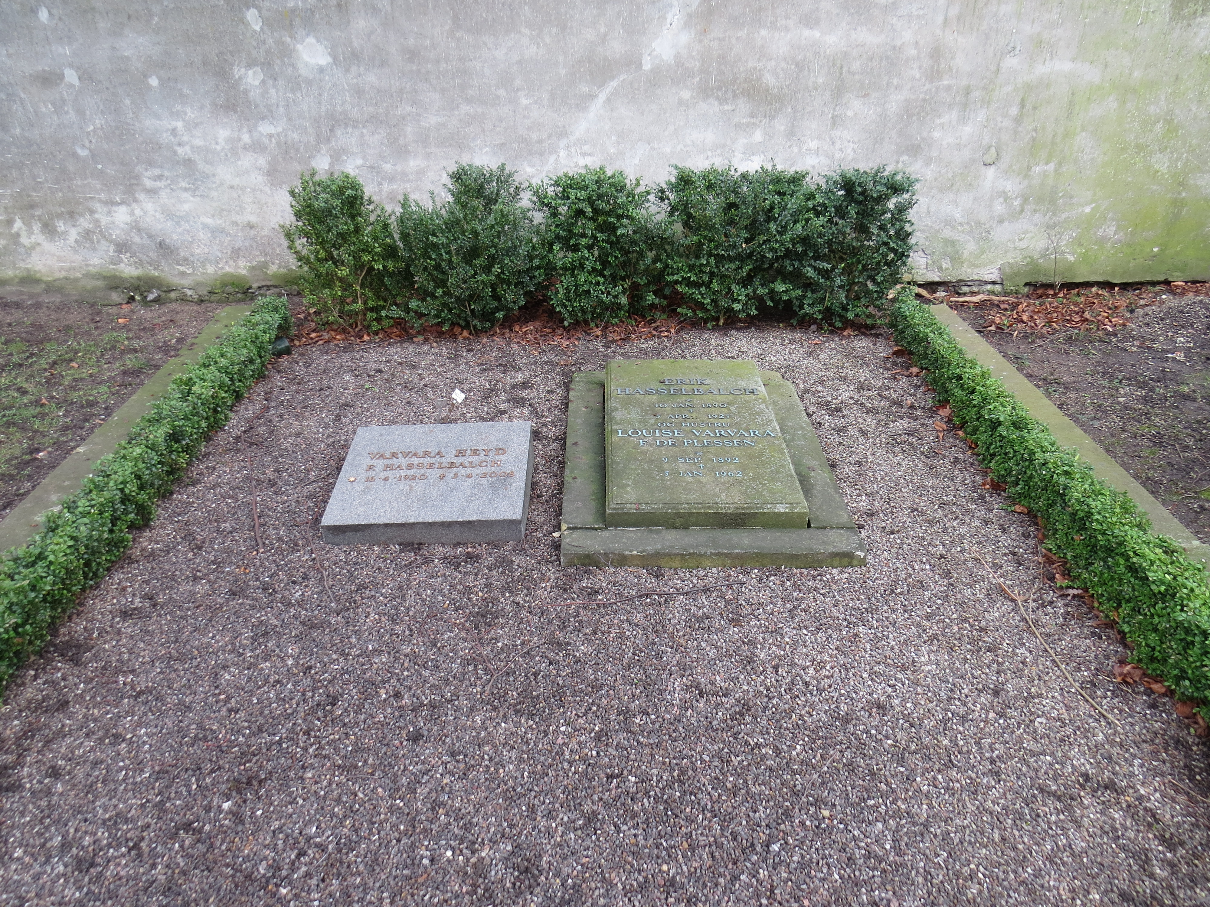 Hasselbalch, gravminde på Garnisons Kirkegård, København